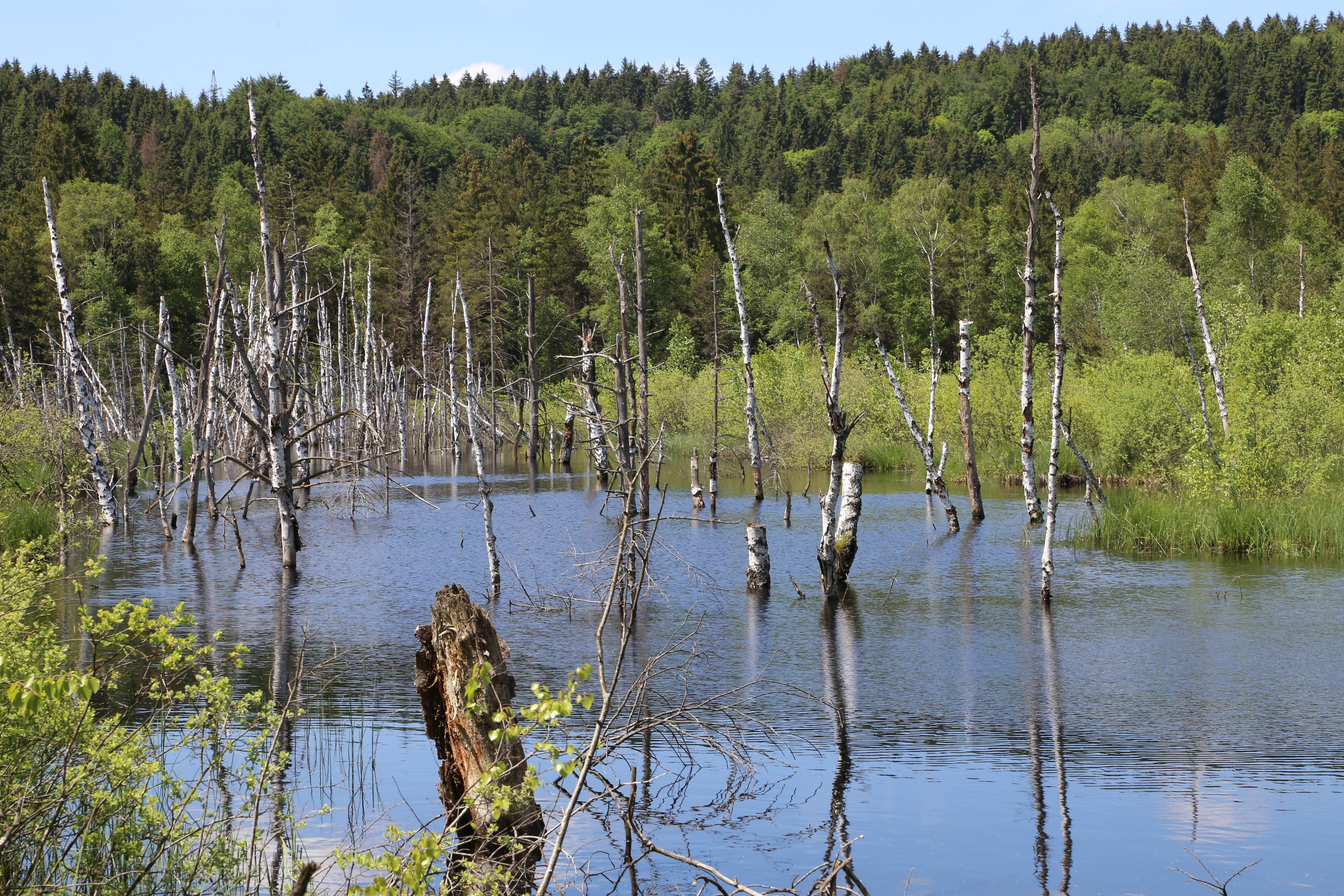 Landschaftsschutzgebiet „Eglinger und Ascholdinger Filze“, LSG-00326.01